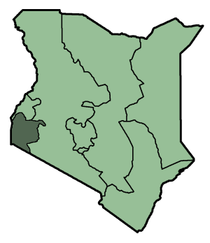 Nyanza Province of Kenya